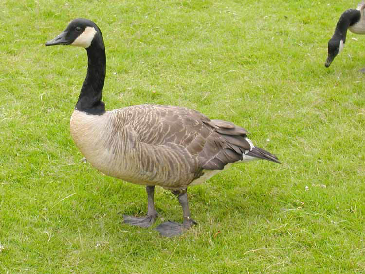 Kanadagans